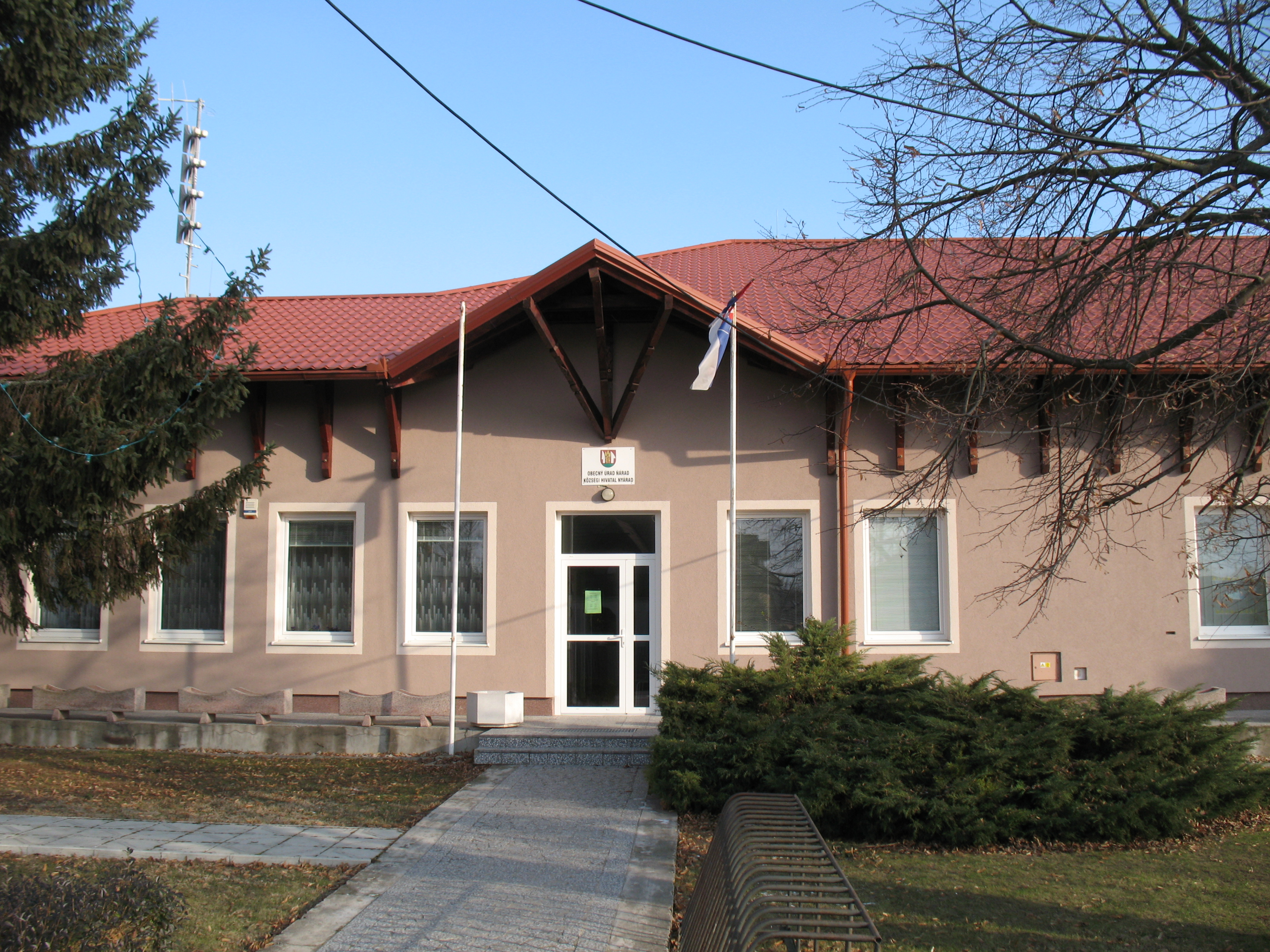 Nyárad községháza